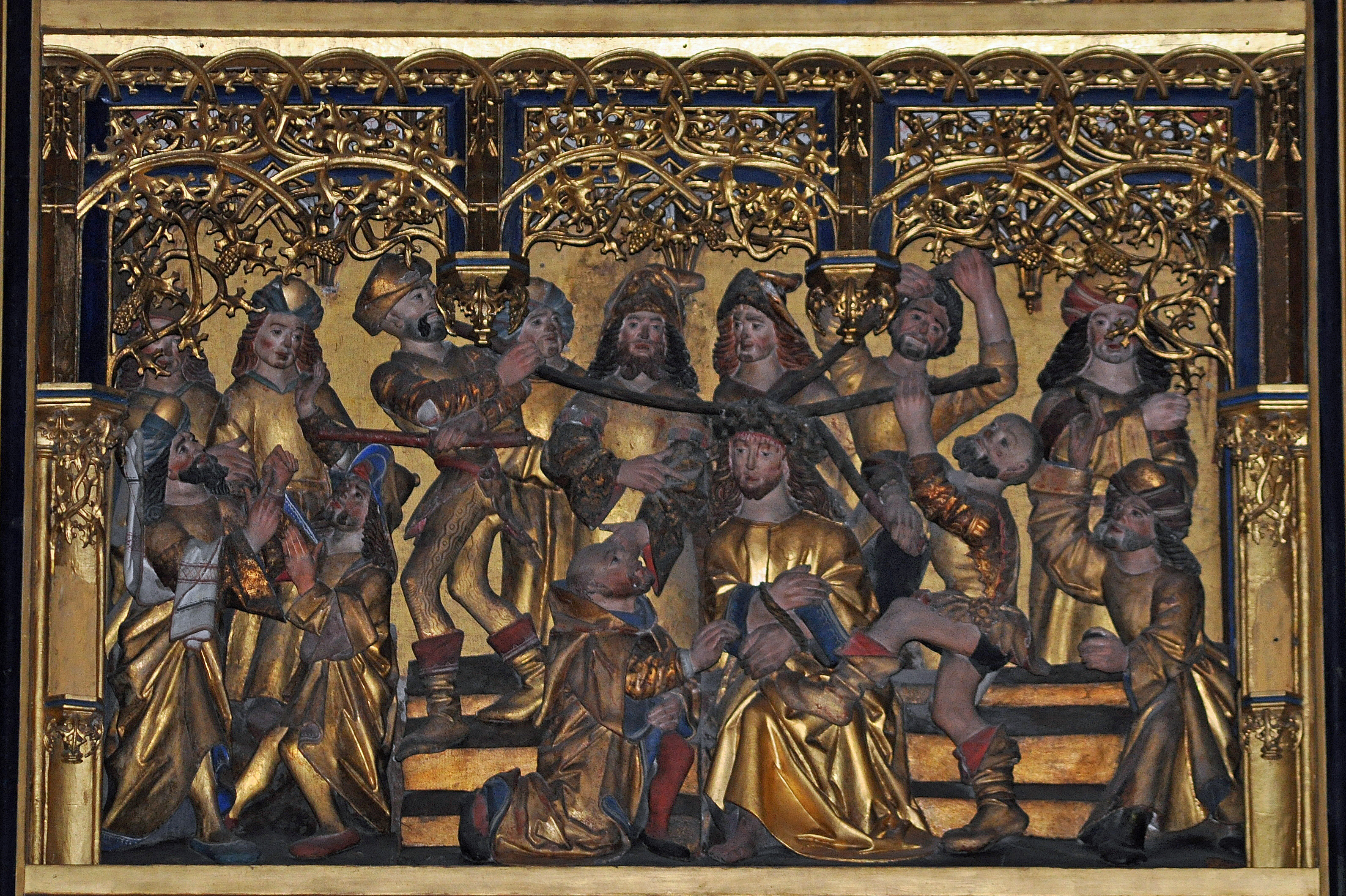 Stralsund, Nikolaikirche, Hochaltar, Schnitzkasten links Mitte (2012-12-29) 1, by Klugschnacker in Wikipedia